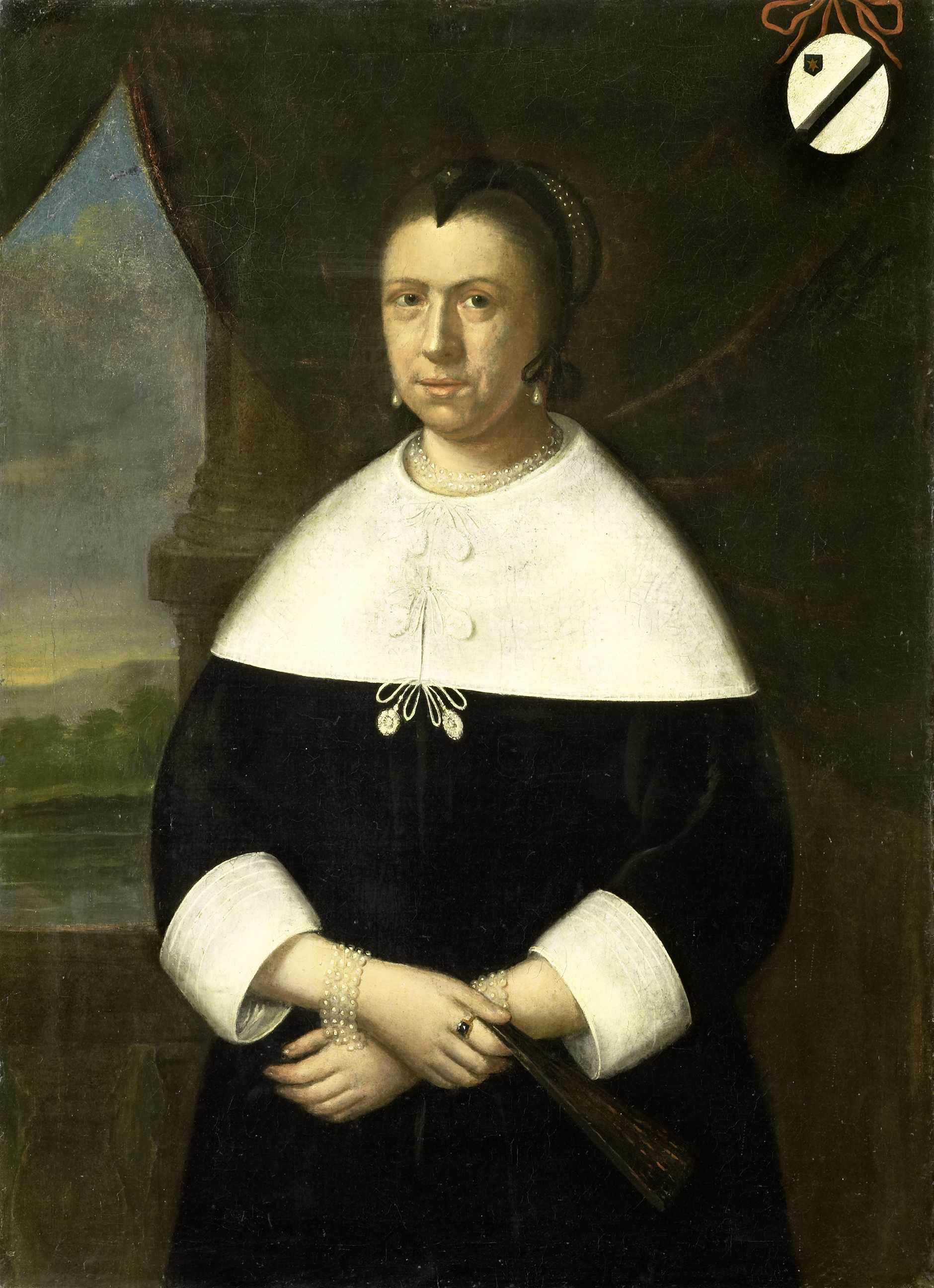 Portret van Maria Quevellerius (1629-64), de eerste vrouw van Jan van Riebeeck, of van diens tweede vrouw Maria Scipio (ca. 1630-95).Ten halven lijve, staand met de armen gekruist voor de buik, waaier in de rechterhand. Rechtsboven het familiewapen. Pendant van SK-A-805.